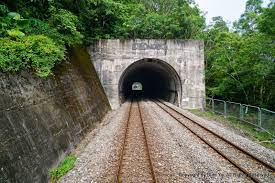 菩安隧道西口